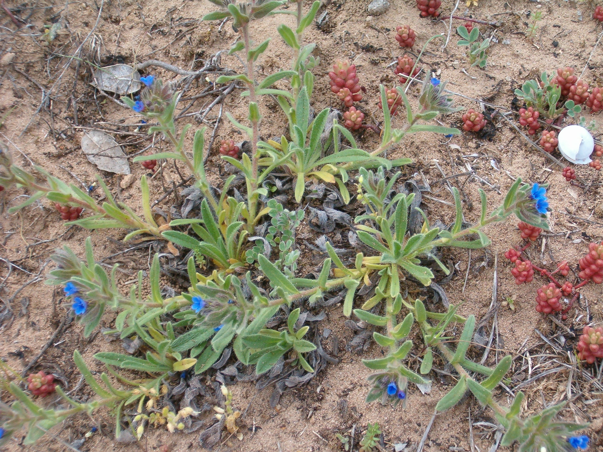 Alkanna matthioli Tausch